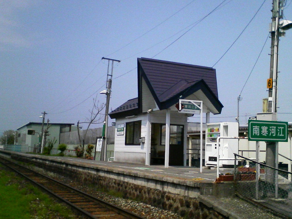 Minami-Sagae Station, Sagae, Yamagata, Japan